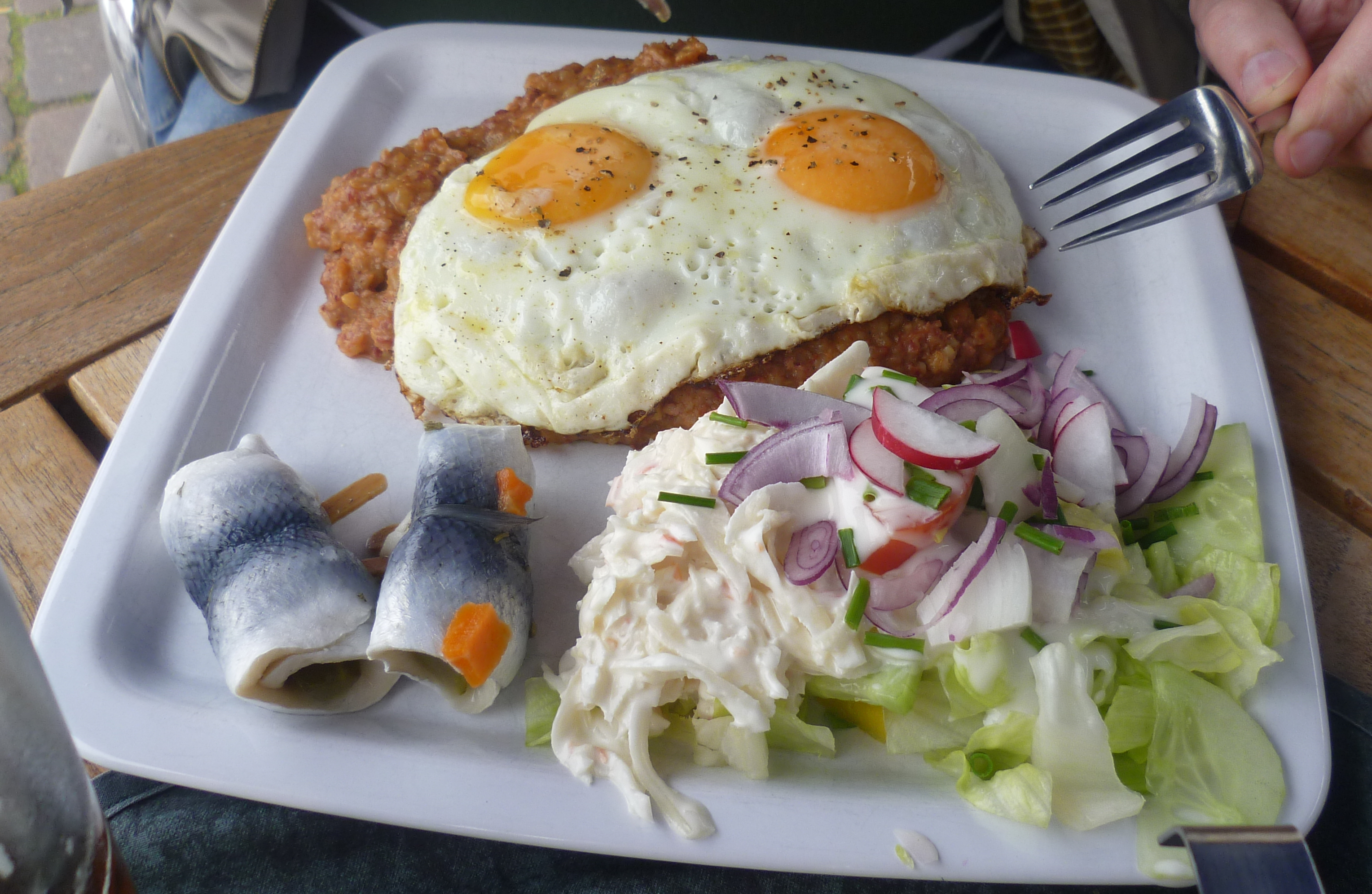 Labskaus mit Rollmops - Das Labskaus selbst enthält keinen Fisch